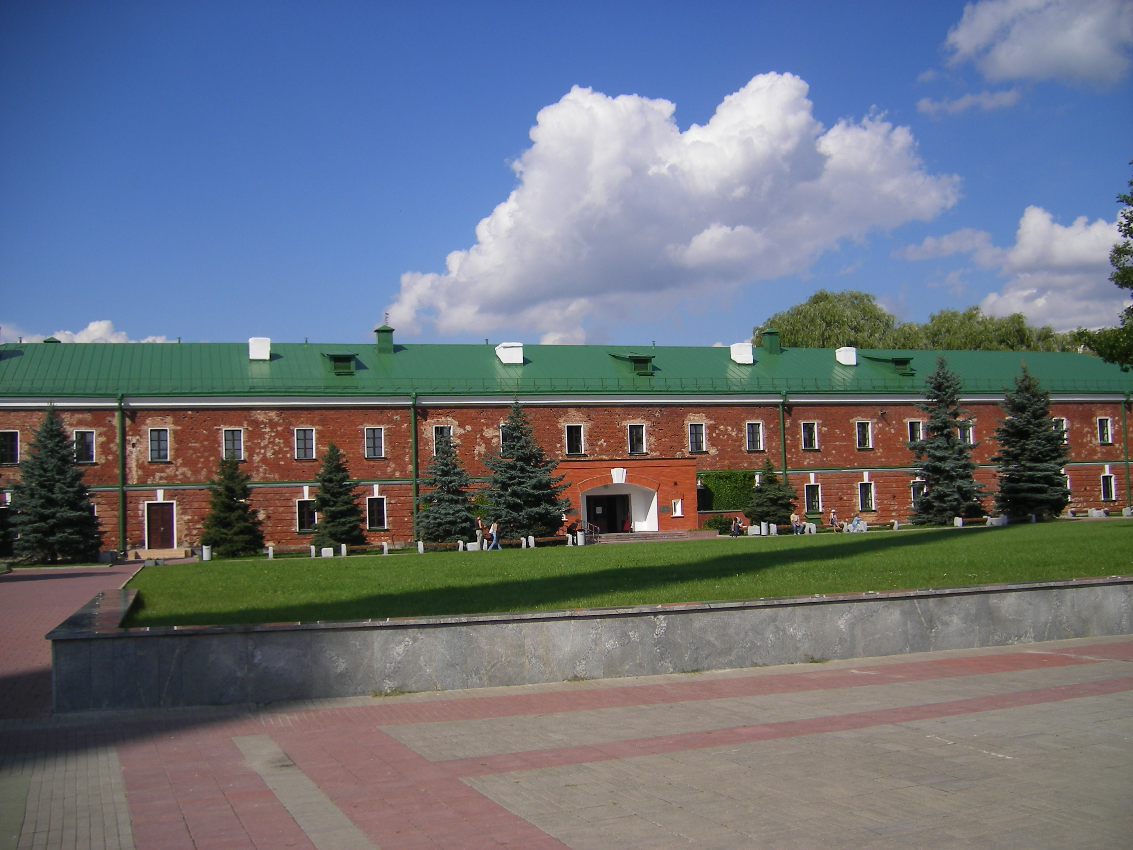 Brest Fortress War Museum